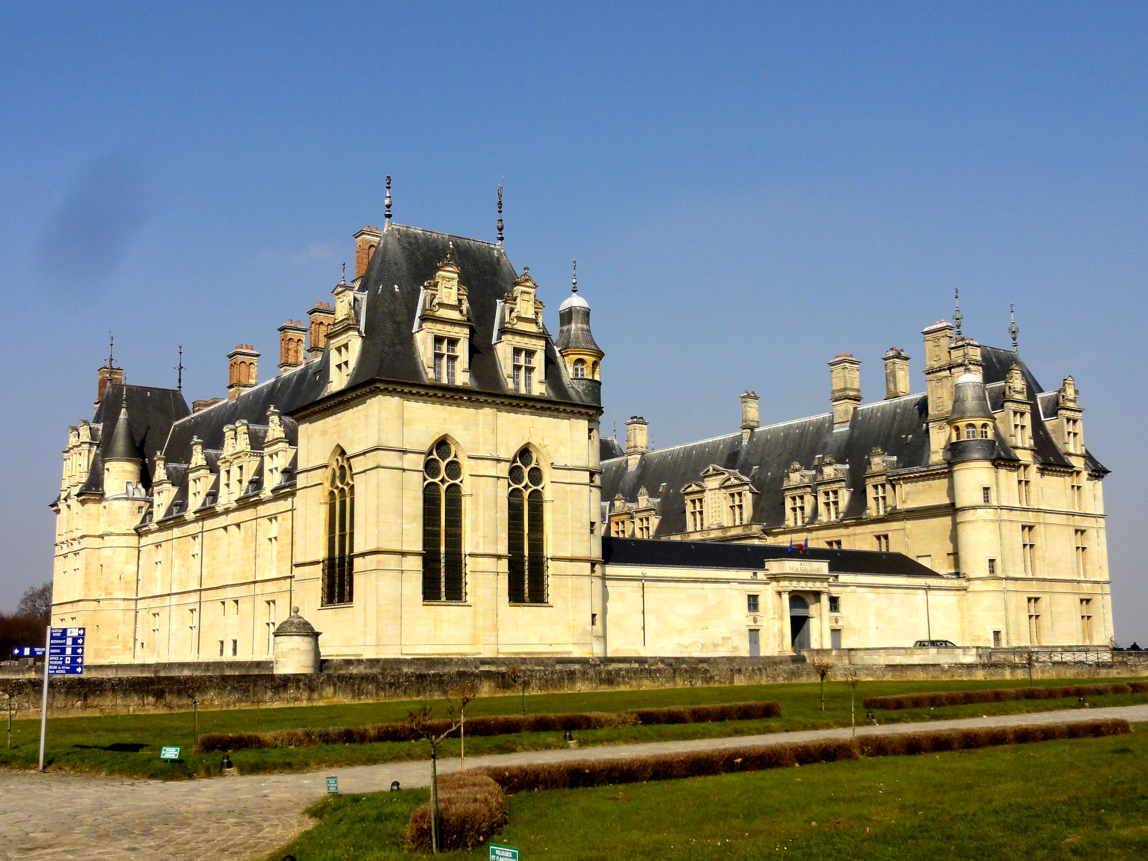 Façade est.